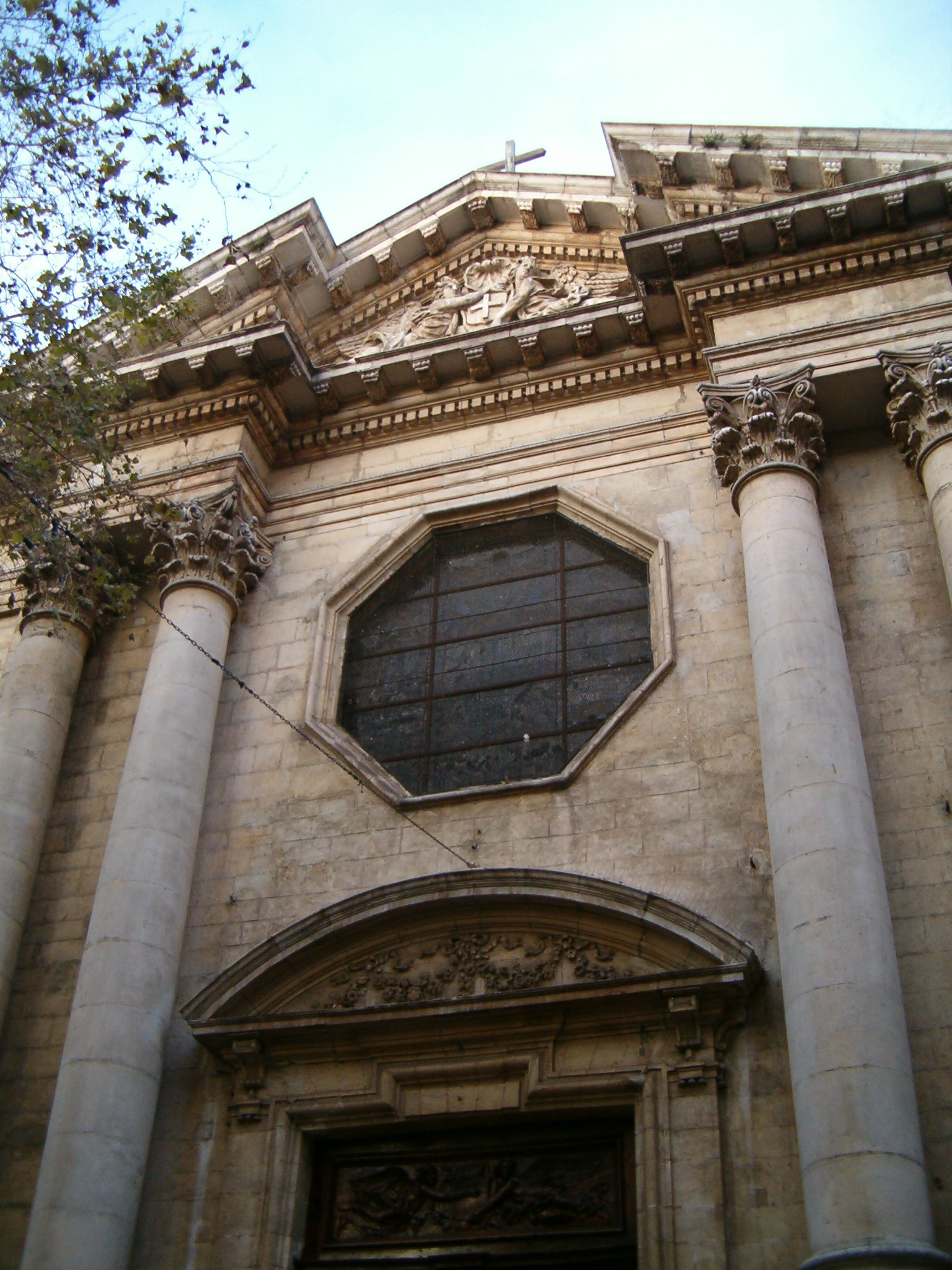 Façade de la Cathédrale de Toulon. Décembre 2006.